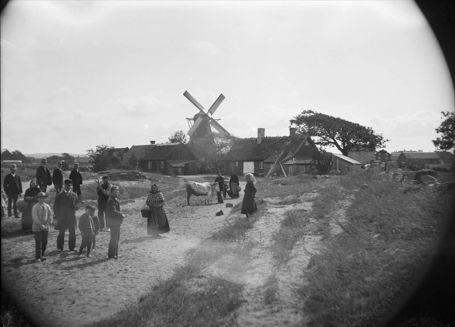 depicted place: Falkenberg (Sverige (SE))